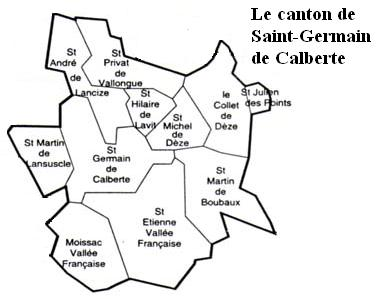 Le canton de St Germain de Calberte Image personnelle